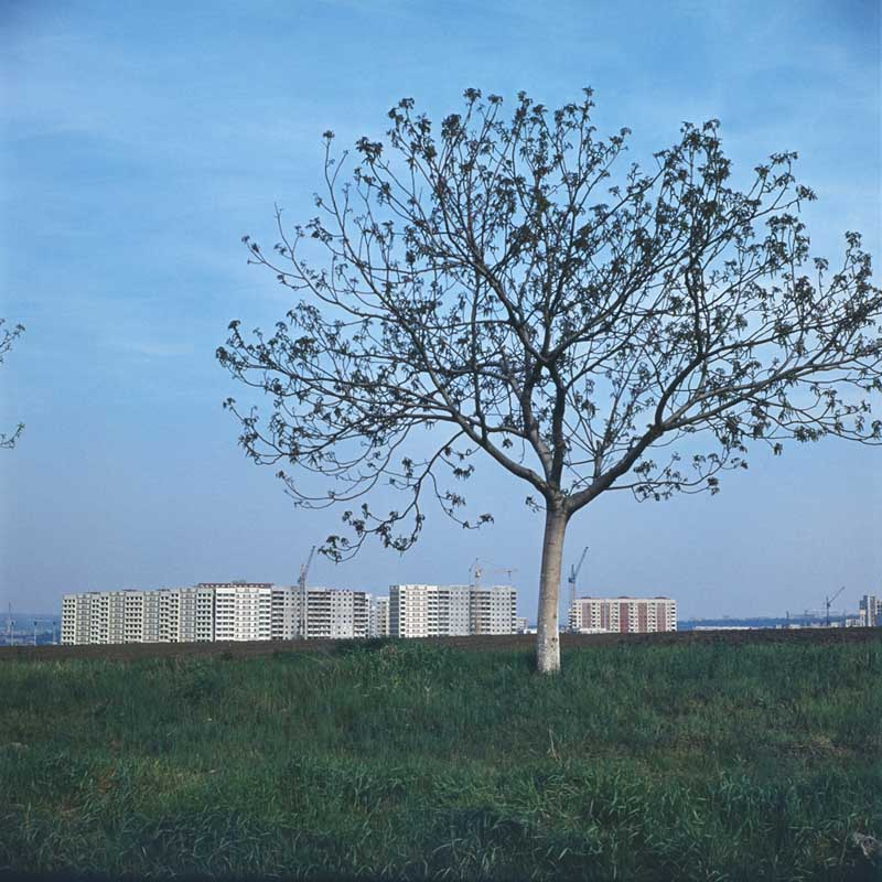 Chisinau.